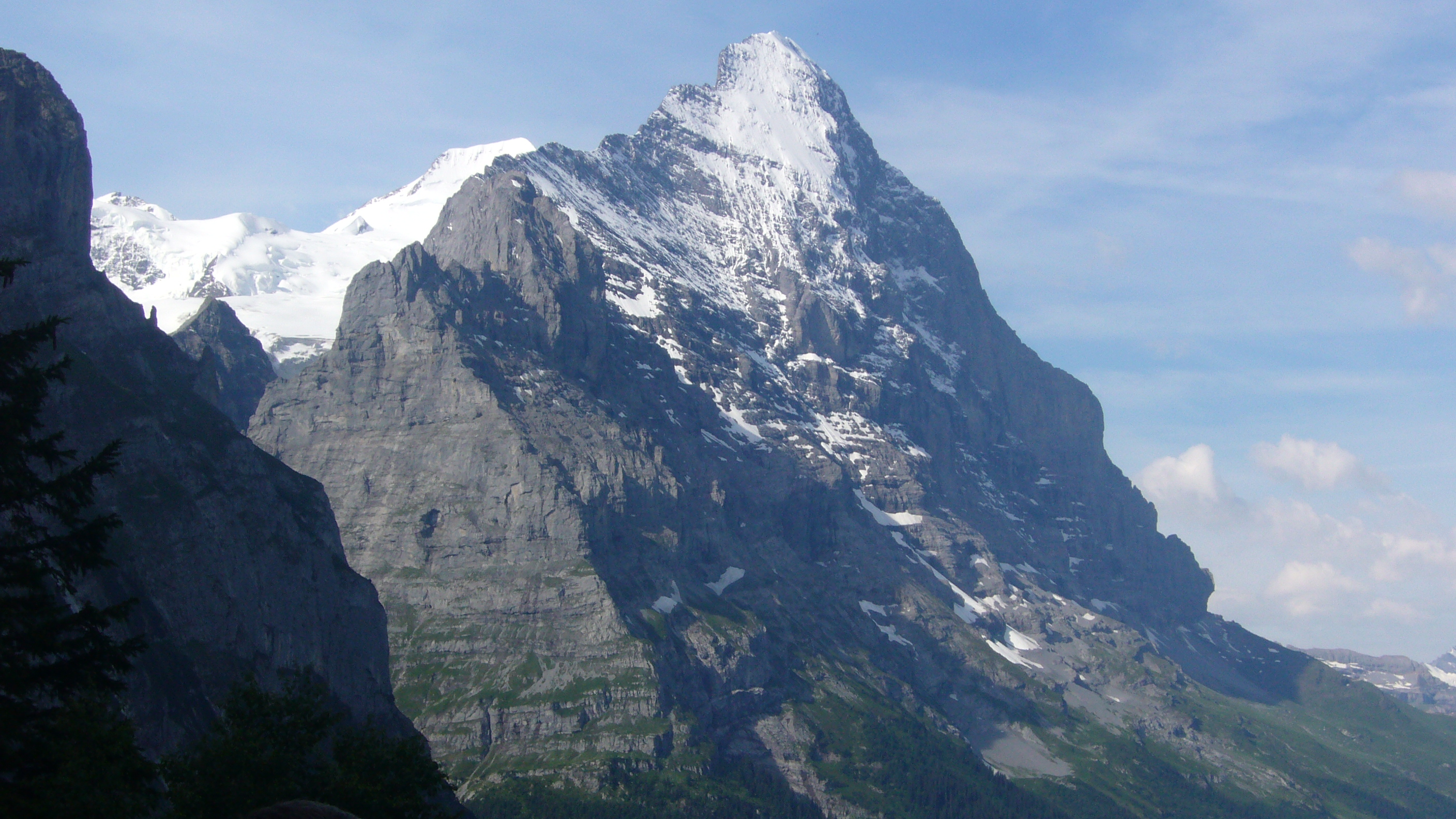 Eiger von der Abz.Gleckstein